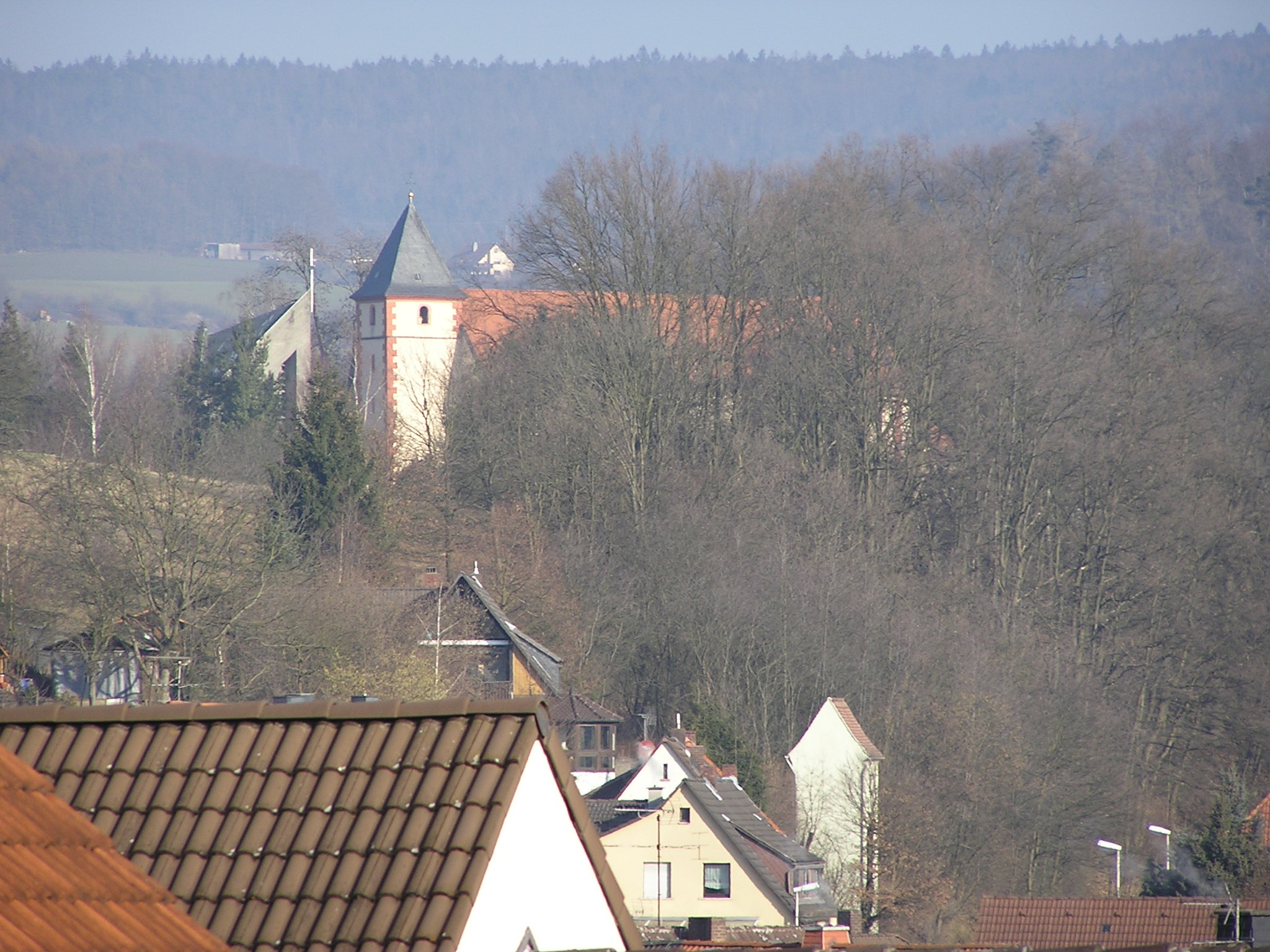 63877 Sailauf, St. Vituskirche